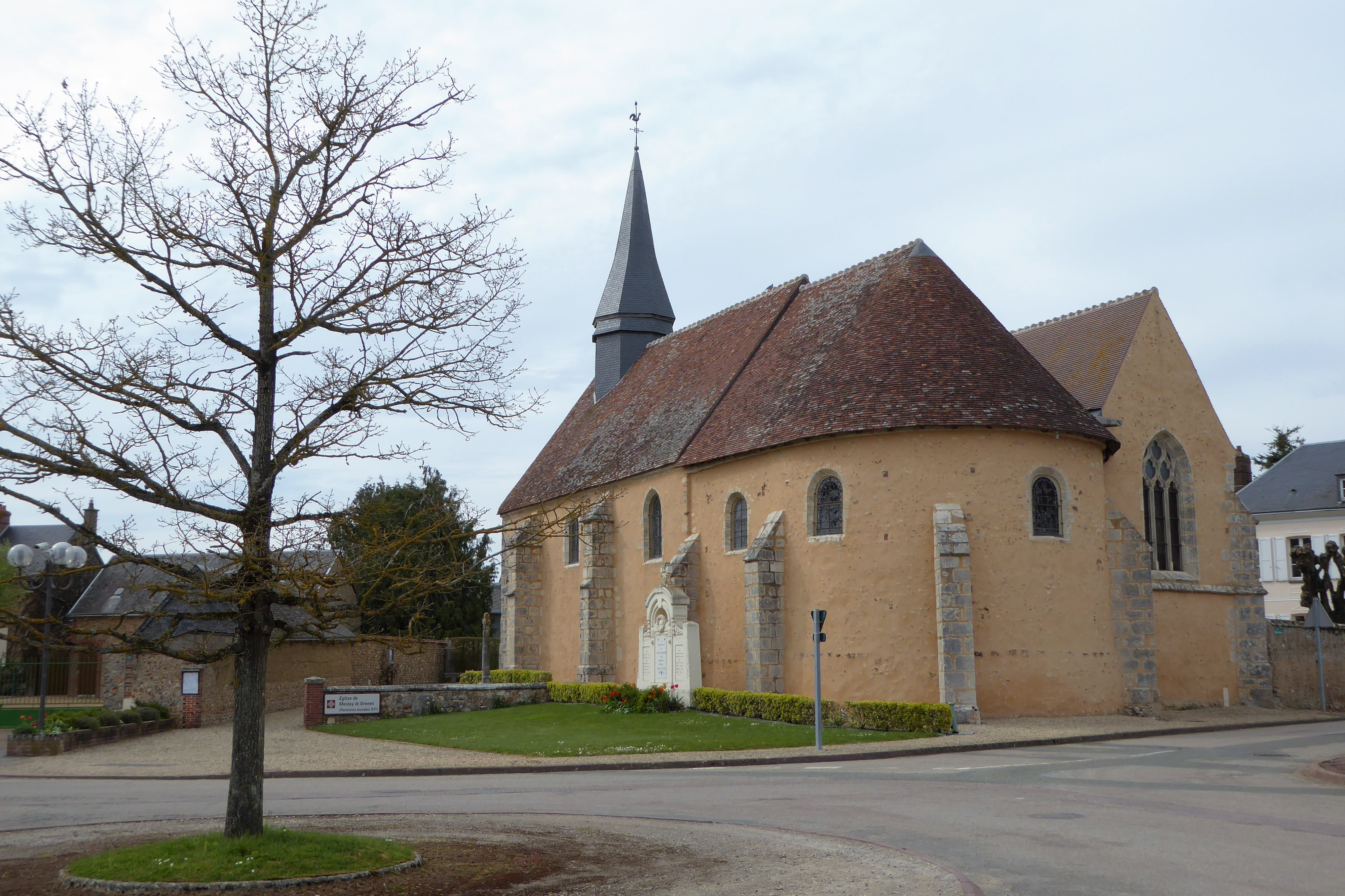 église Saint-Orien et monument aux morts de Meslay-le-Grenet, Eure-et-Loir, France.